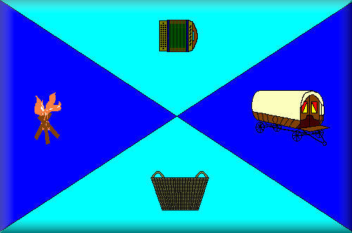 Drapeau Yeniche